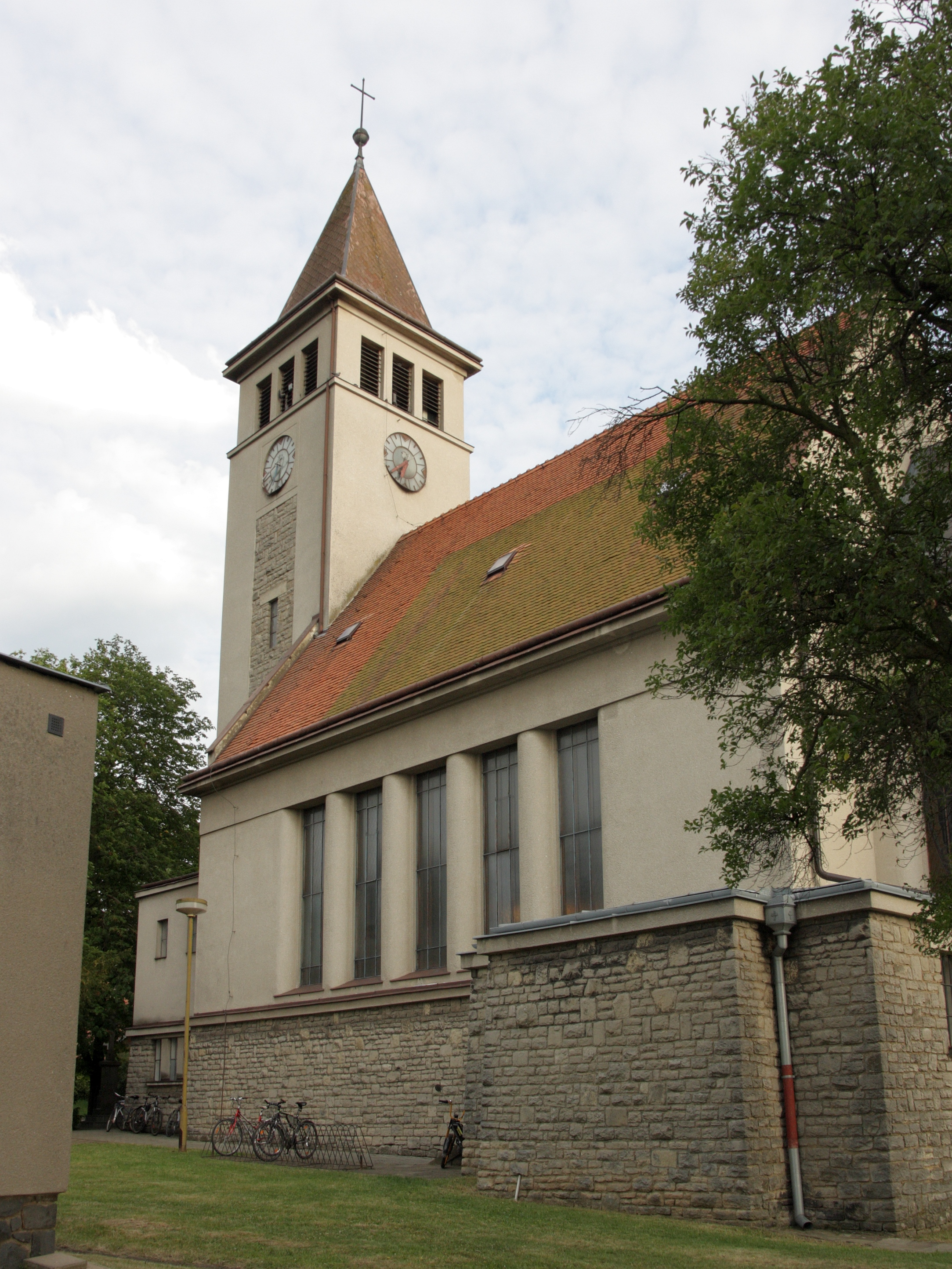 Blažovice - kostel Božského srdce Páně.